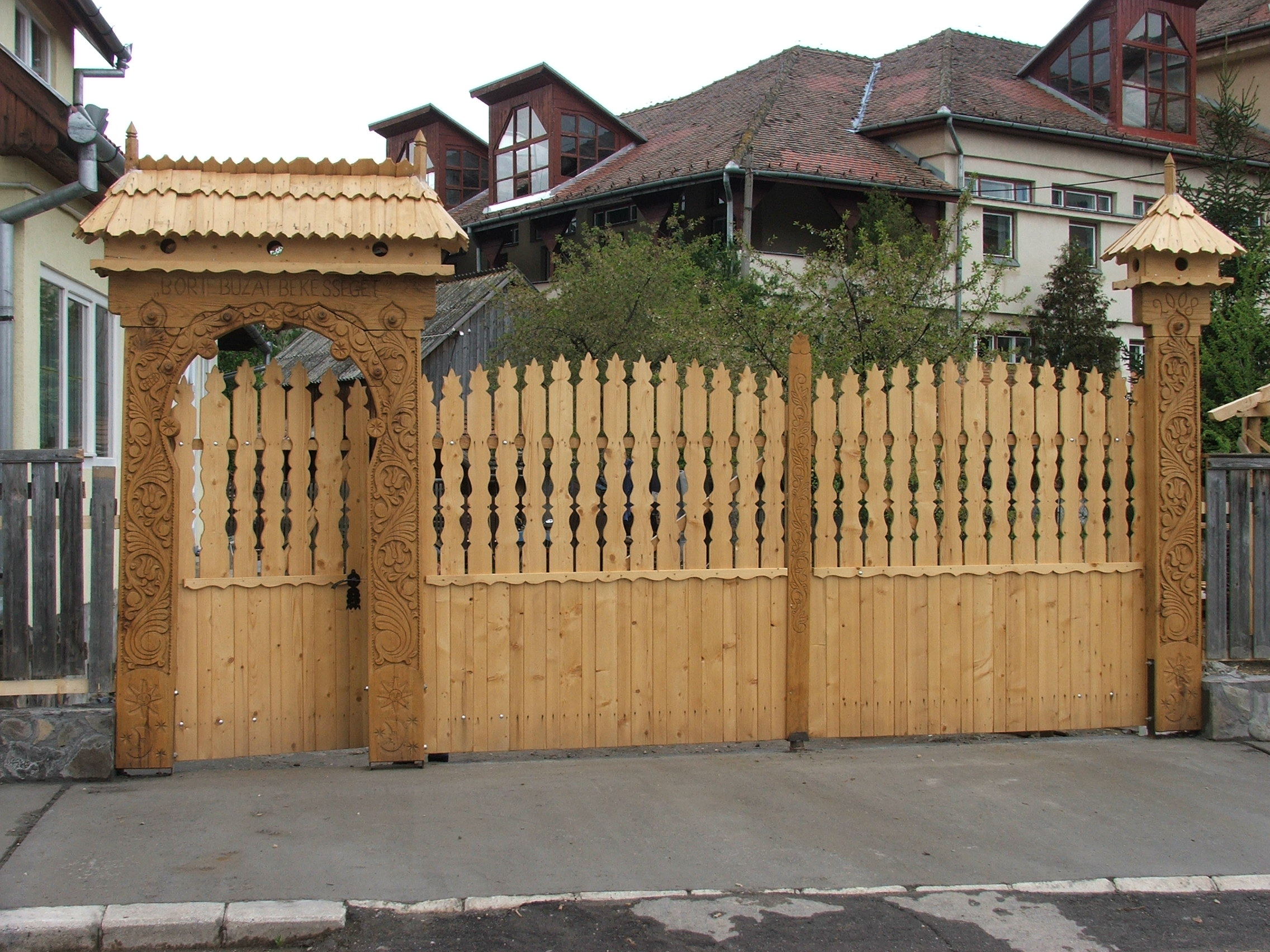 Székelykapu Kovásznán